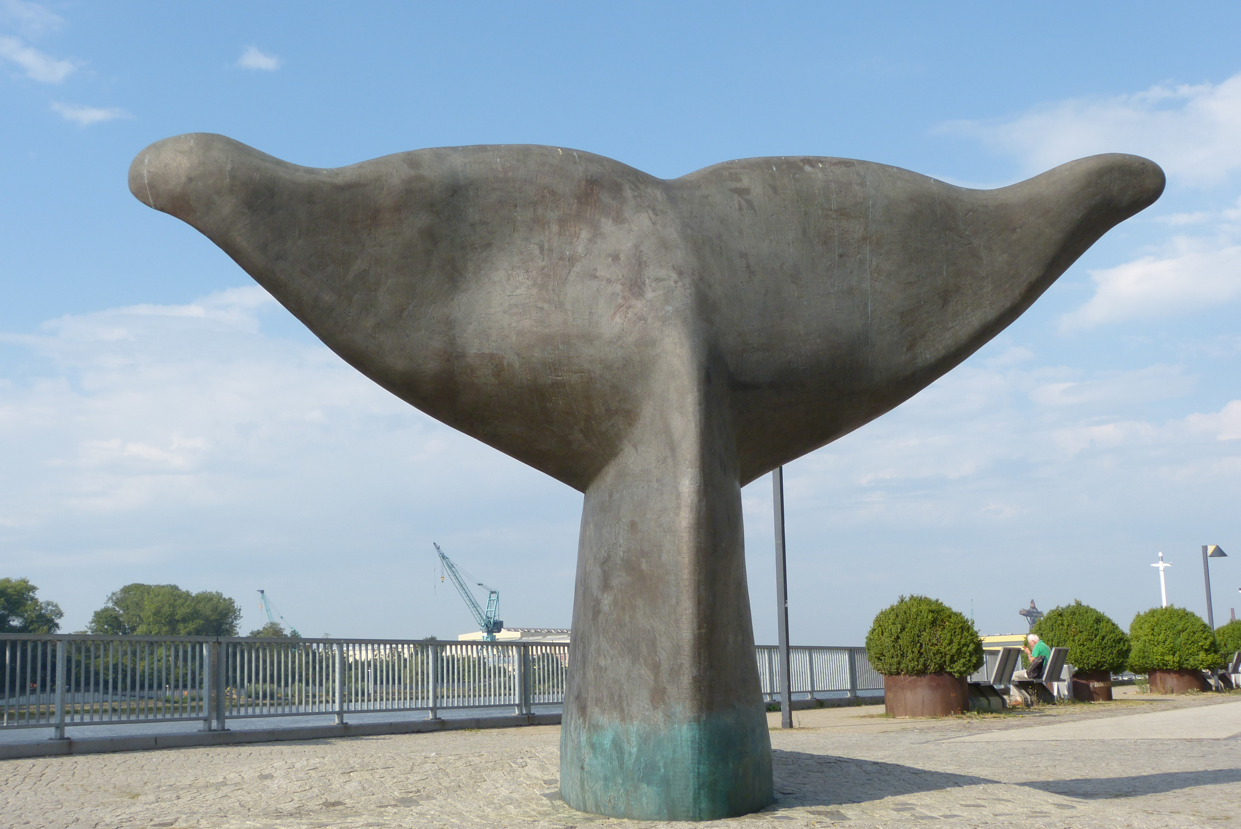 Vegesacker Wal-Schwanzflosse – Denkmal in Bremen-Vegesack auf der Weserpromenade beim Vegesacker Hafen. Die Skulptur stammt von dem Bildhauer Uwe Häßler und wurde 1995 aufgestellt.